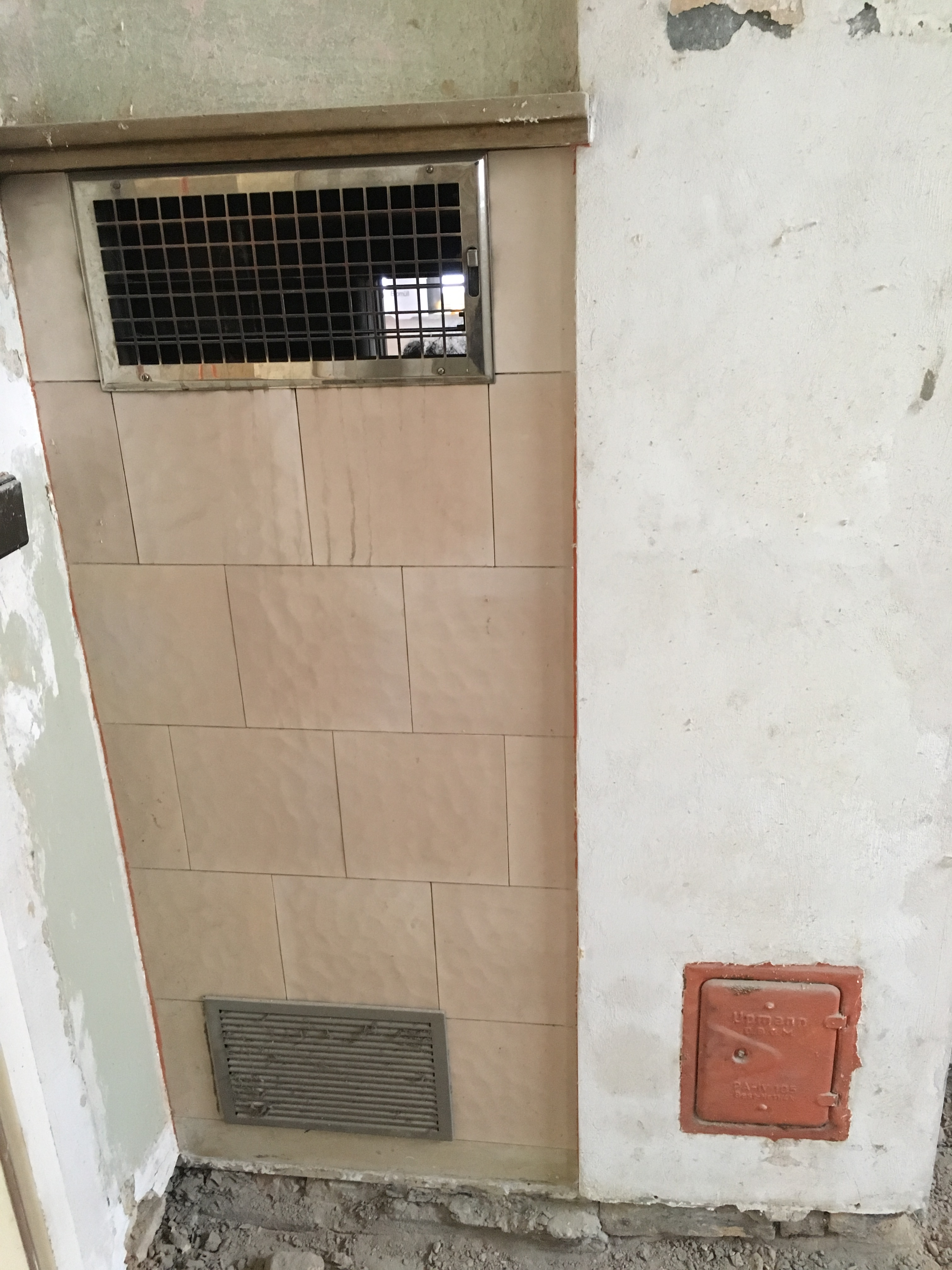 Oben strömt die Warme Luft in den Raum, unten wird die kalte Luft angesaugt und zurück zur Heizung befördert.